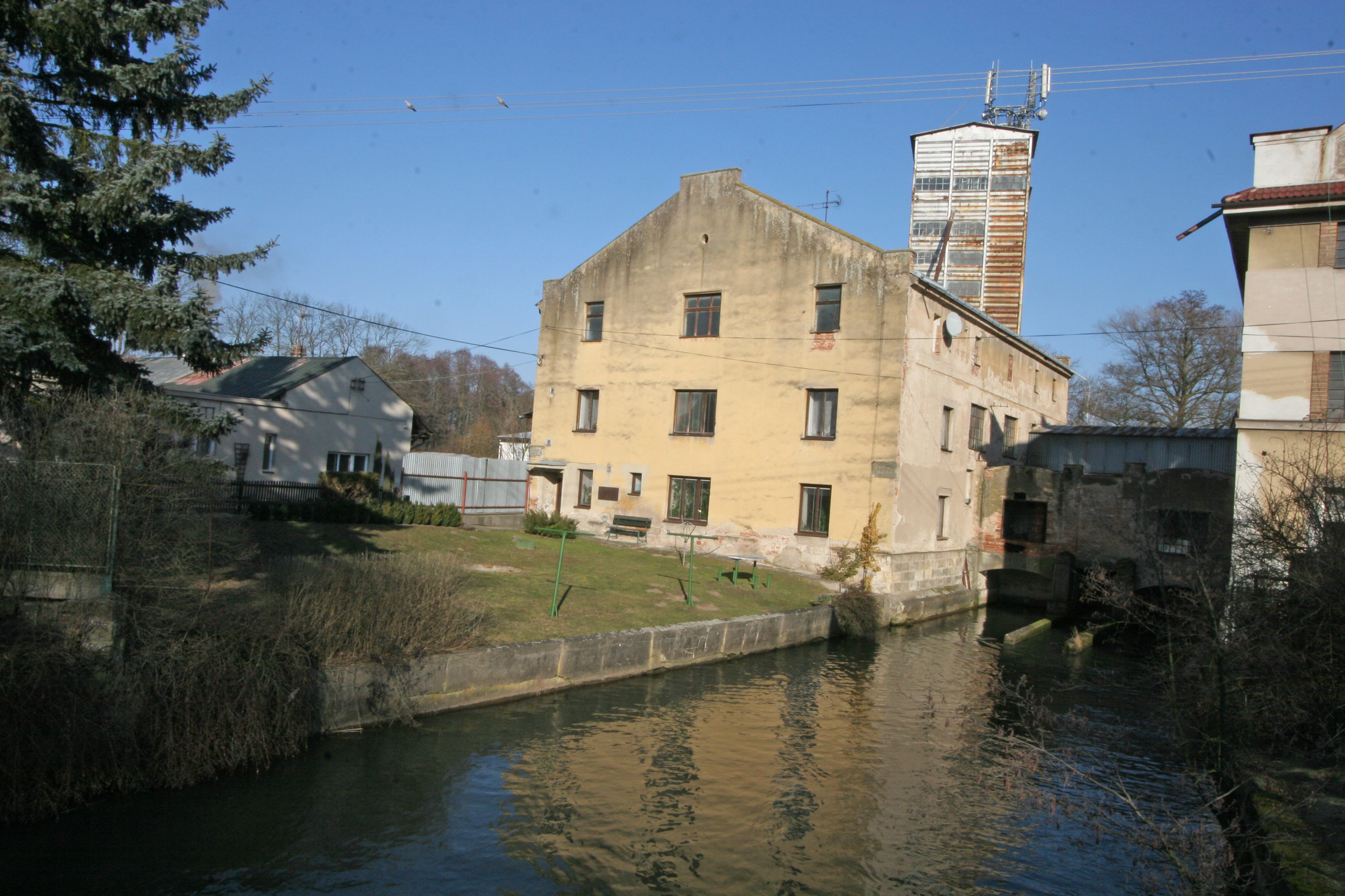 Česky: Lázně Bohdaneč, Šípkova Zadní mlýn